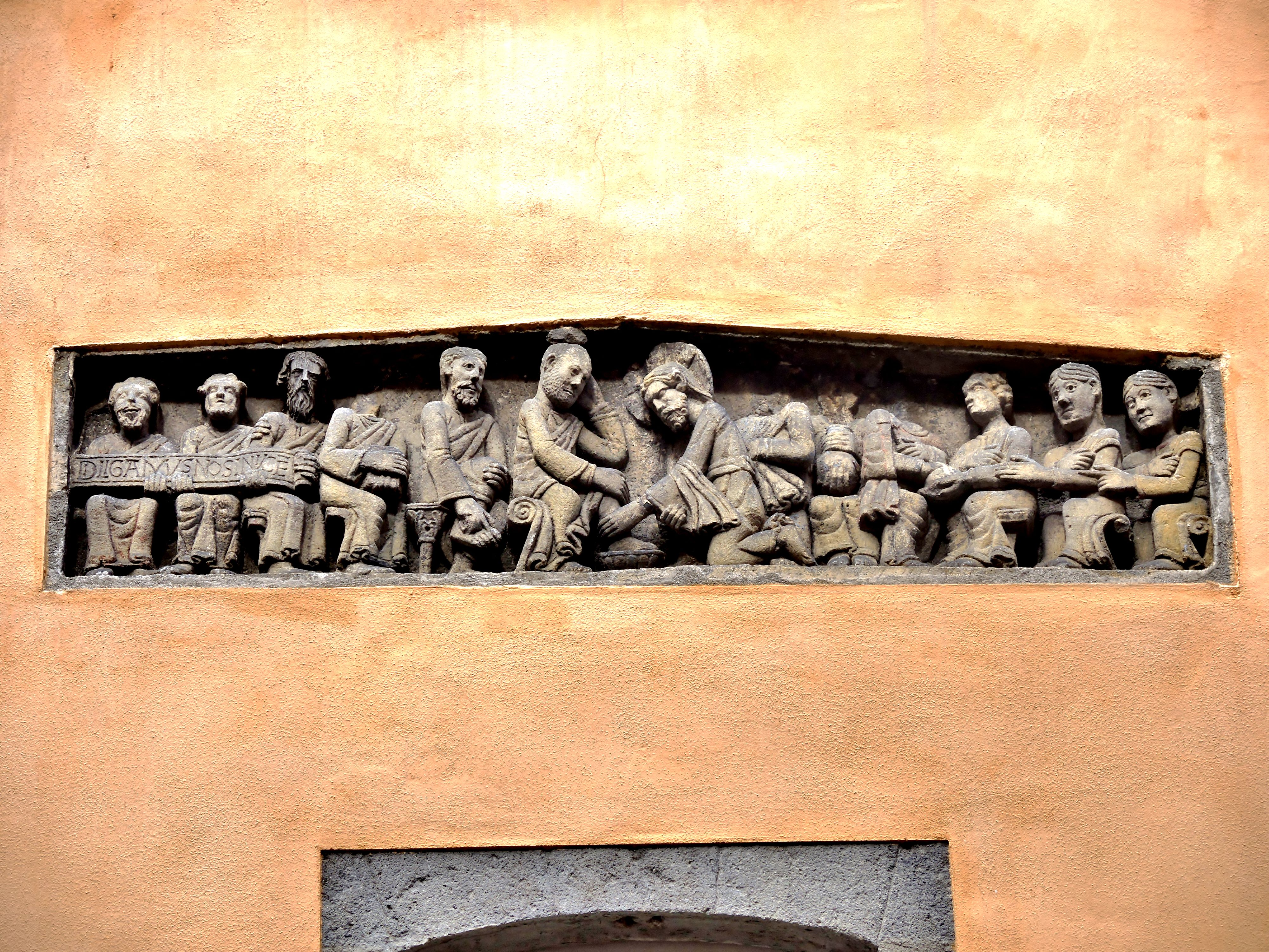 Linteau du XII è siècle, rue des Gras. Clermont-Ferrand. Puy-de-Dôme